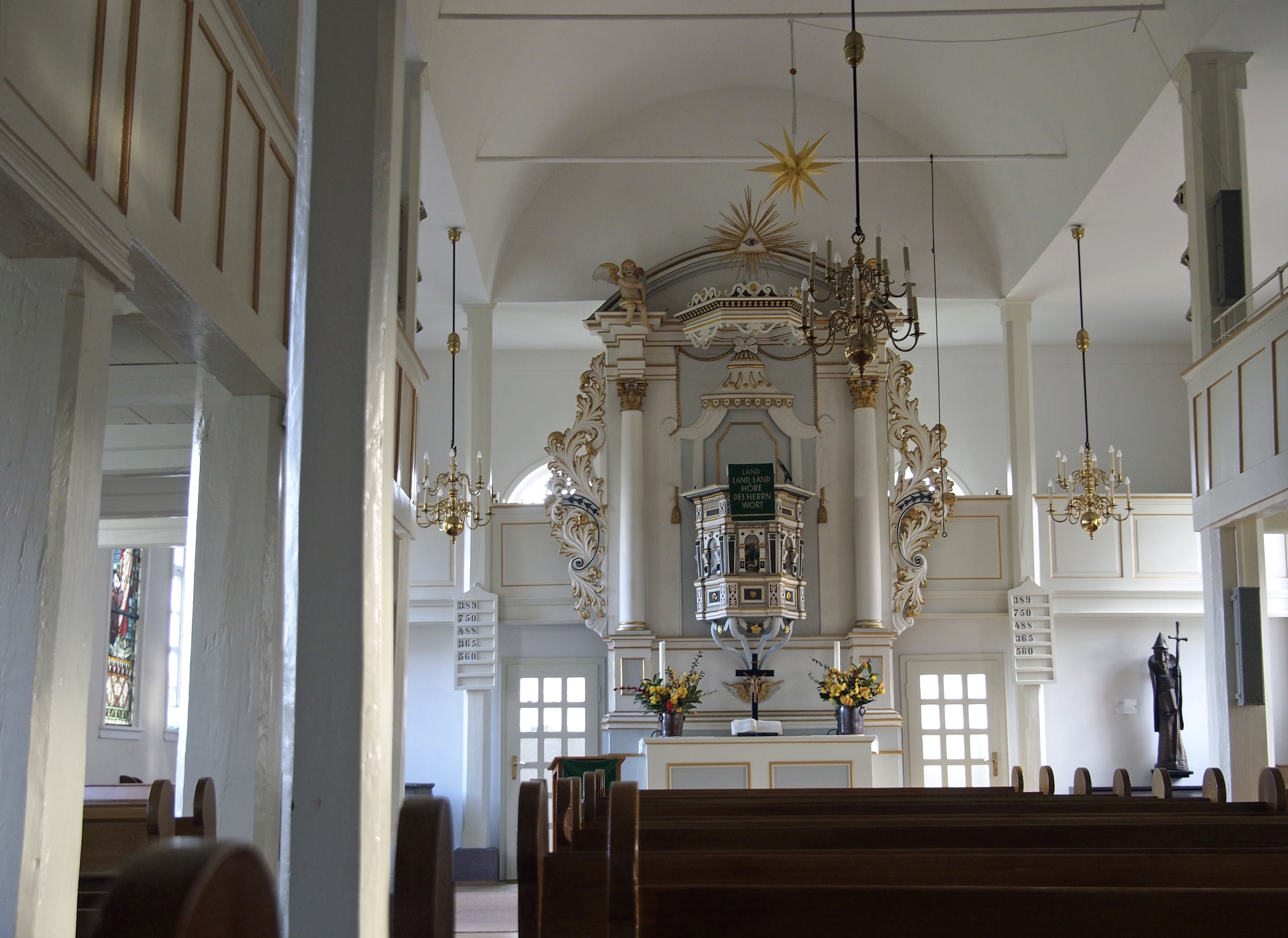 Innenraum und Altar der Fabian-und-Sebastian-Kirche Sülze (Bergen)